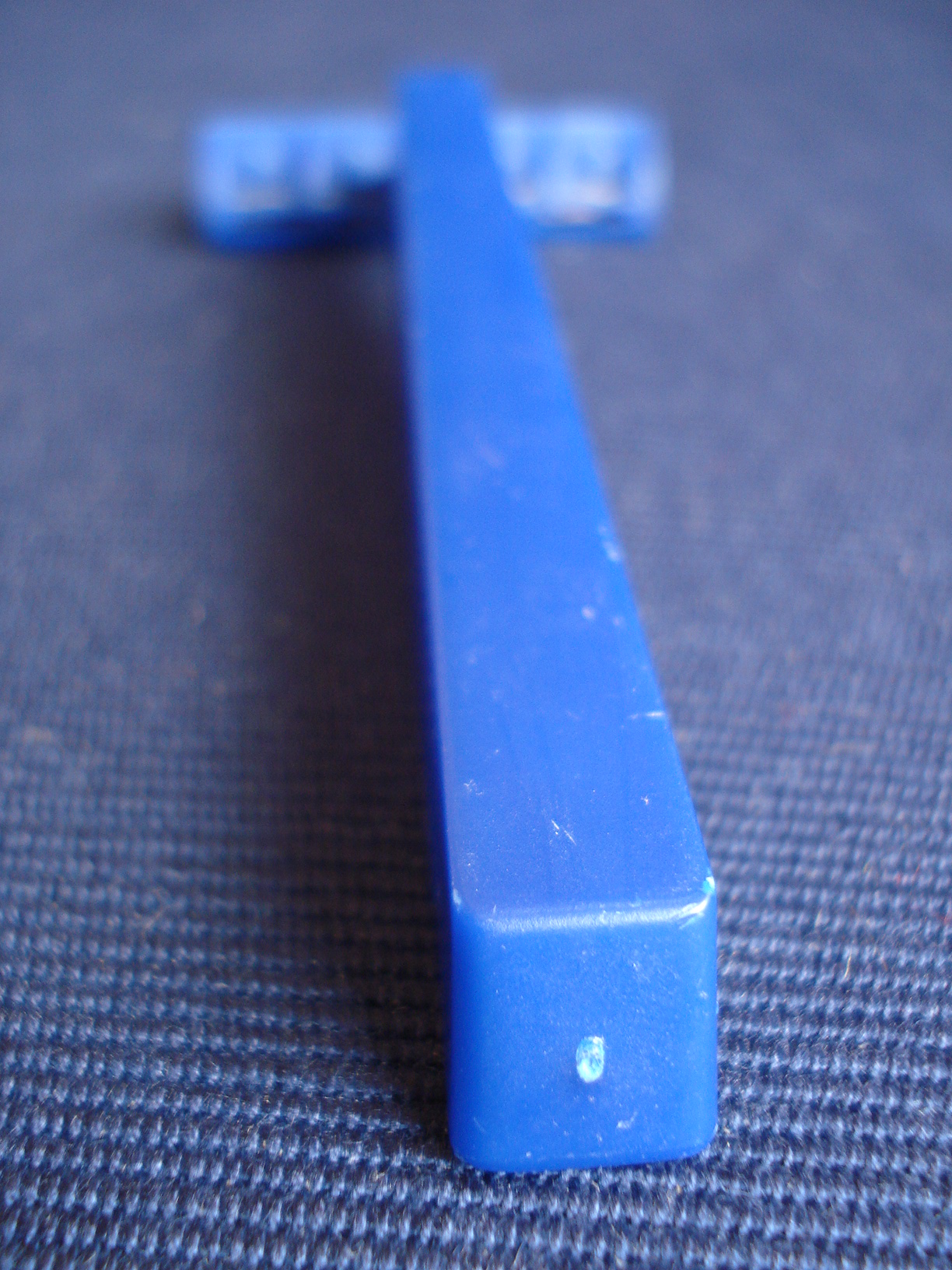 Marca dejada por el punto de entrada del poliestireno al molde en un objeto conformado mediante moldeo por inyección